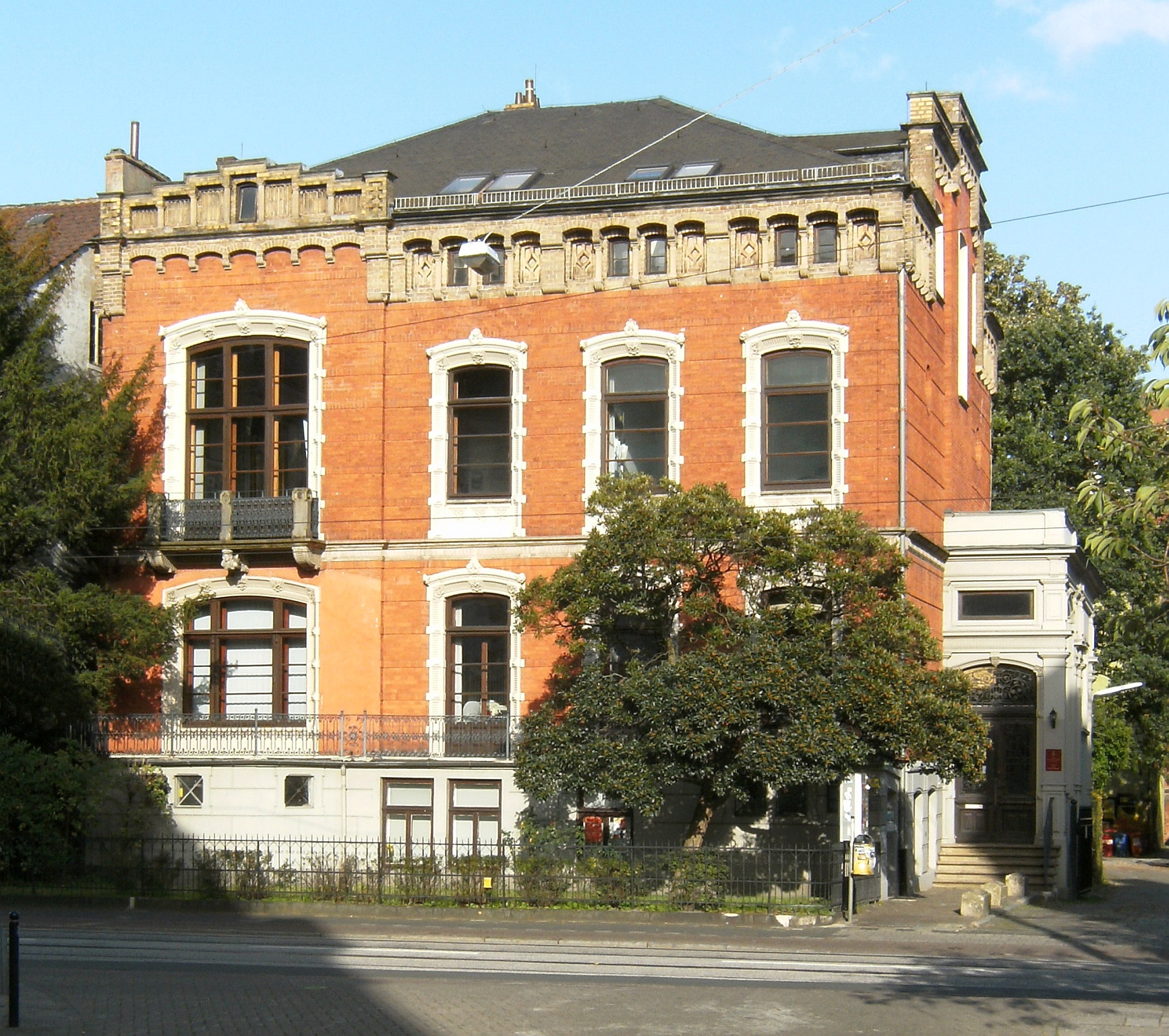 Villa Rutenberg, Ortsamt in Bremen, Am Dobben 91. Das abgebildete Objekt ist ein geschütztes Kulturdenkmal in der Freien Hansestadt Bremen, mit der Nr. 0050 beim Landesamt für Denkmalpflege registriert.